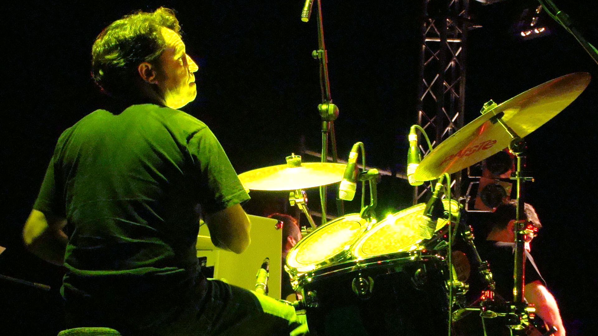 foto Antonio Valero, batería de la Blues Band en Concierto